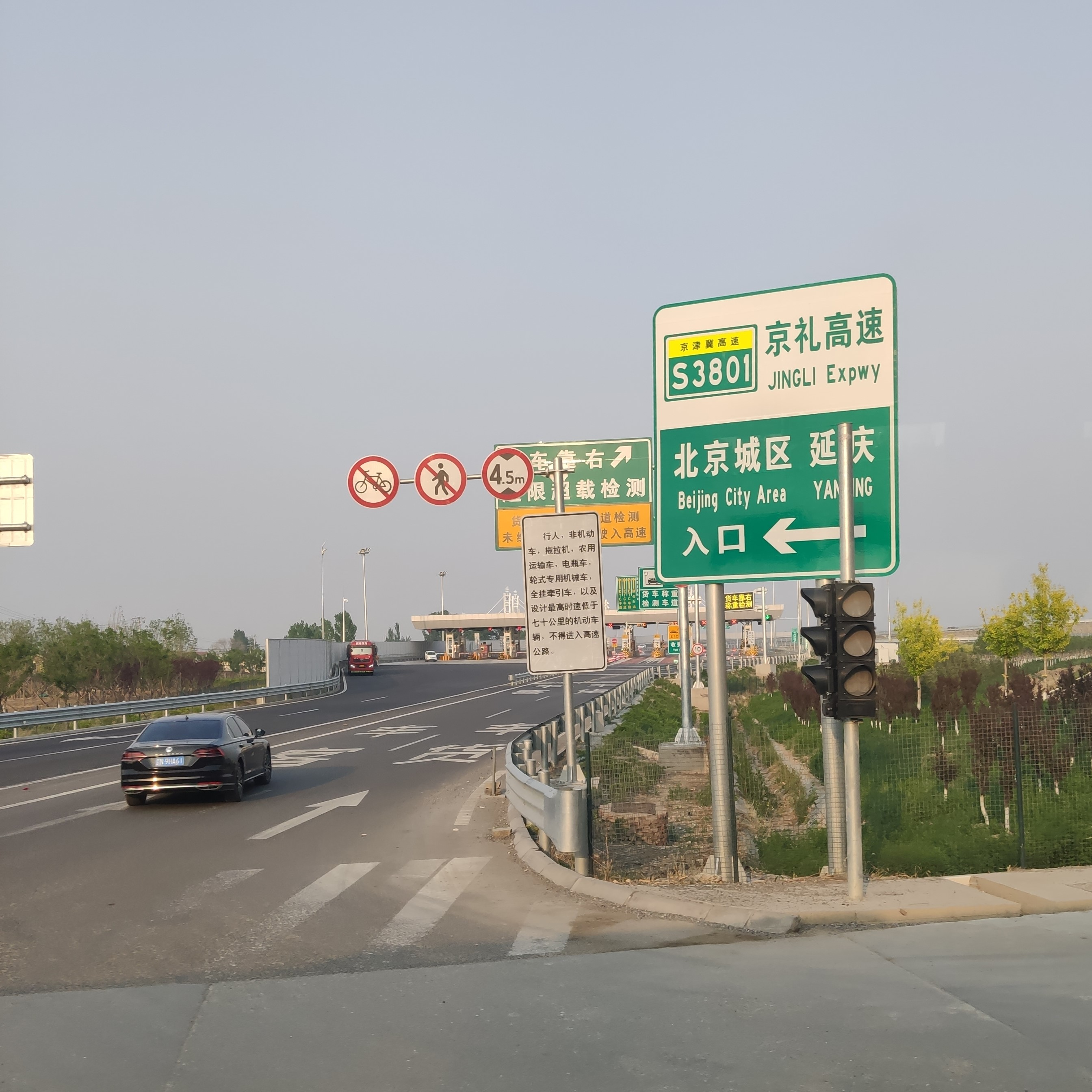 京礼高速标志（葛村入口）